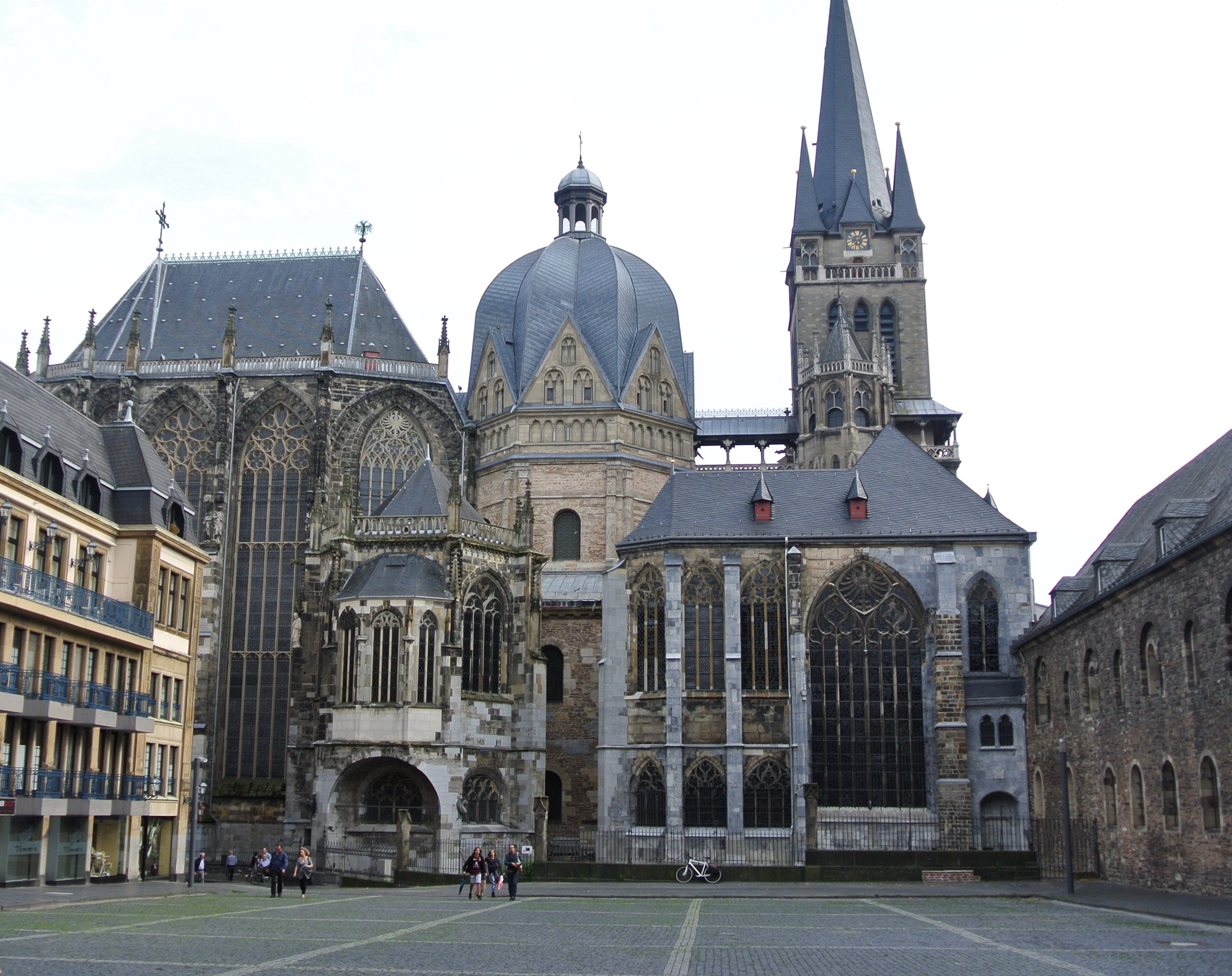 Aachener Dom This is a photograph of an architectural monument.It is on the list of cultural monuments of Aachen